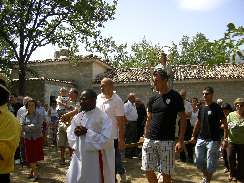 il 15 agosto presso la chiesa dell'Assunta la statua della Madonna viene portata in processione dai roccatani